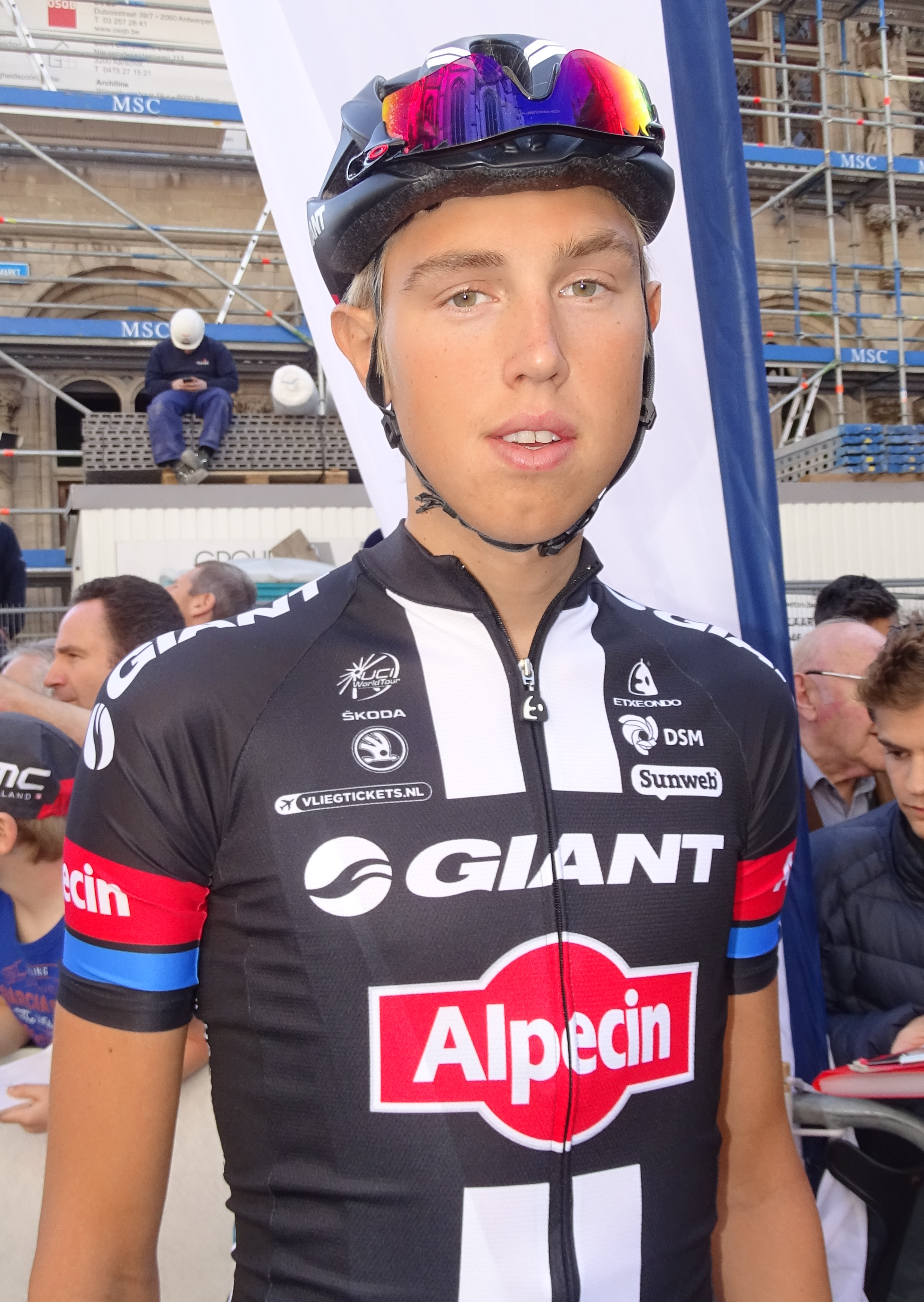 Reportage réalisé le mercredi 15 avril à l'occasion du départ de la Flèche brabançonne 2015 à Louvain, Belgique.